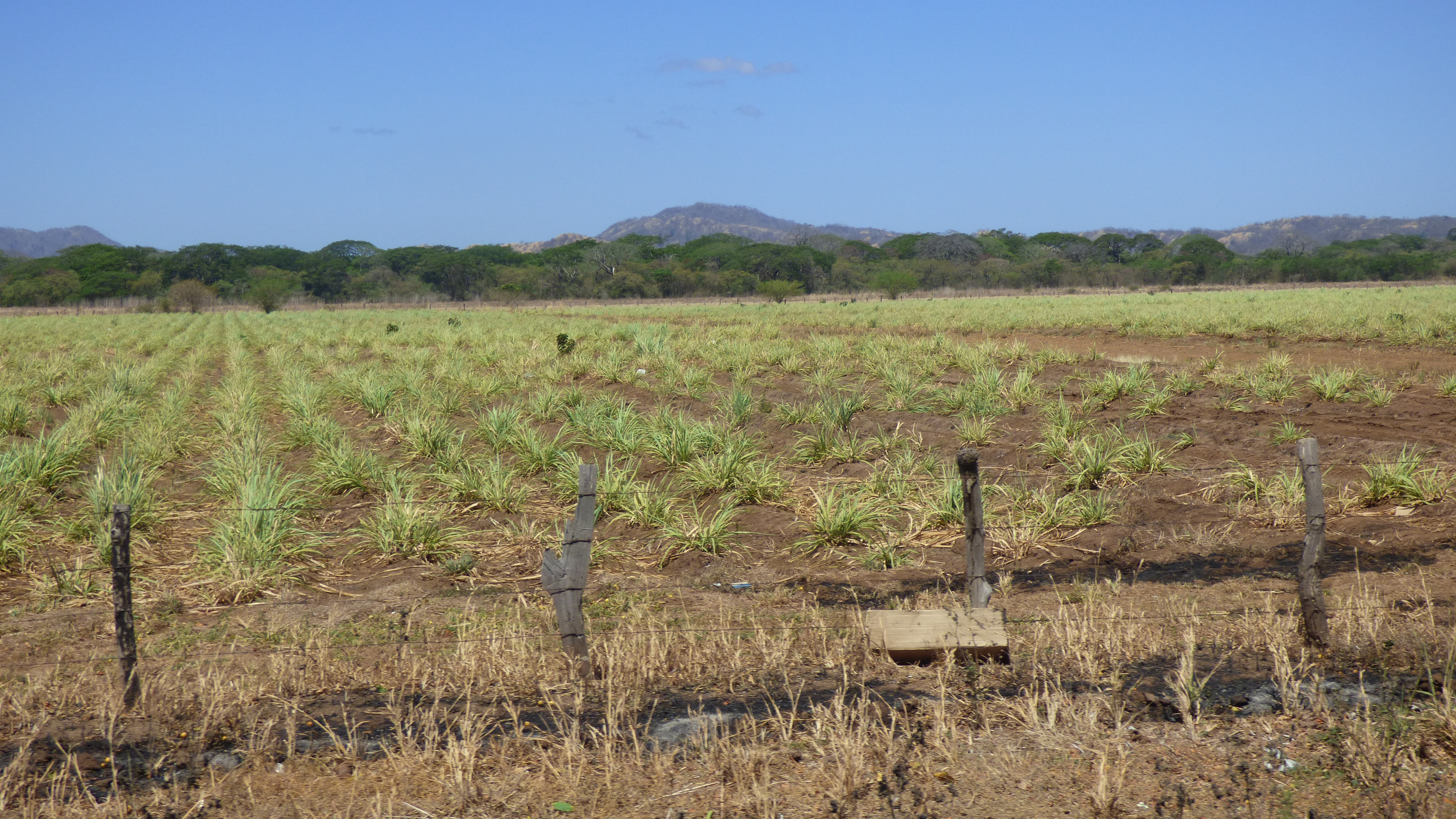 Estación seca en el cantón de Santa Cruz, Guanacaste, Costa Rica.